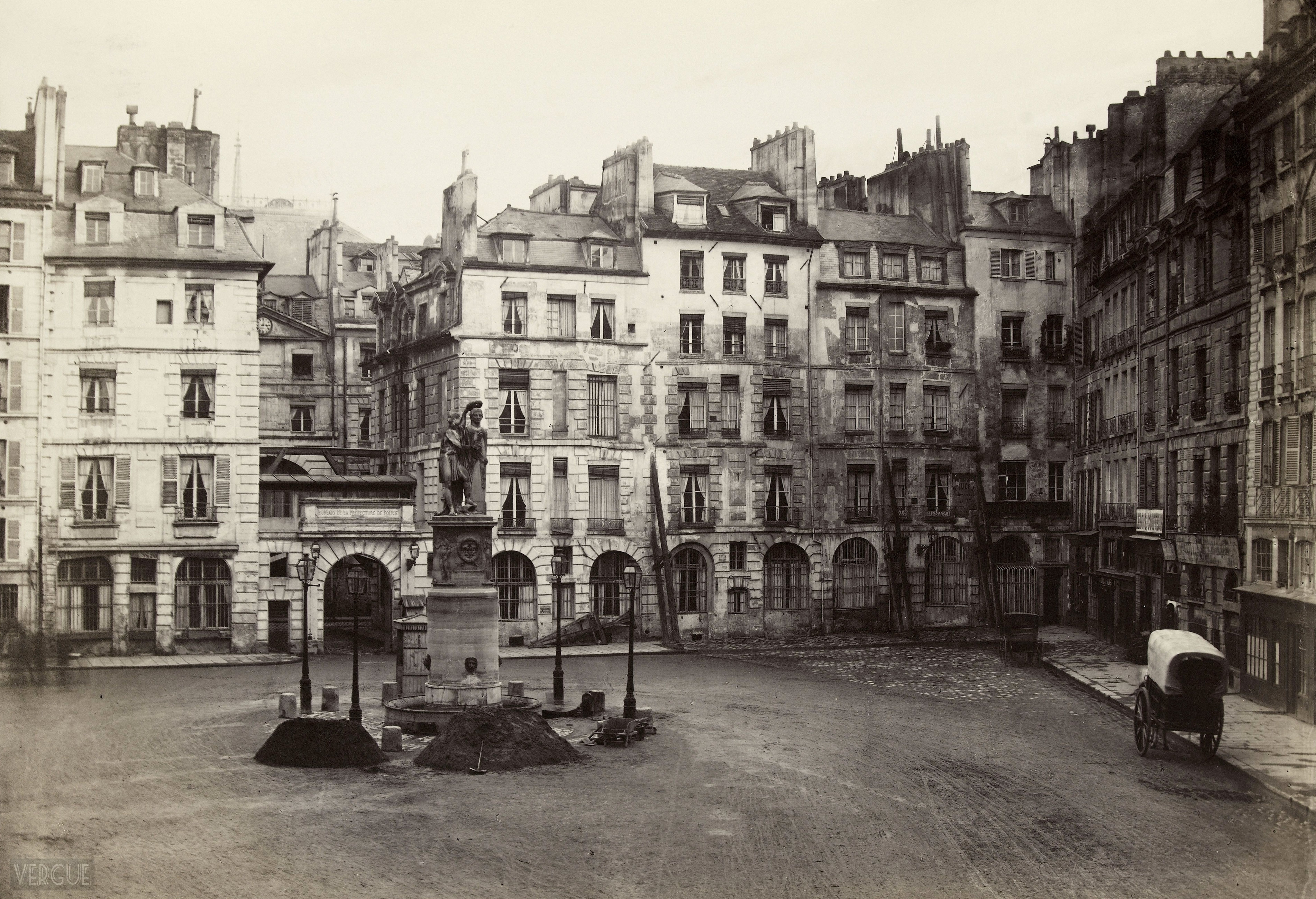 Paris, La place Dauphine. Tirage sur papier albuminé, 37 x 25.3 cm, Bibliothèque historique de la Ville de Paris.